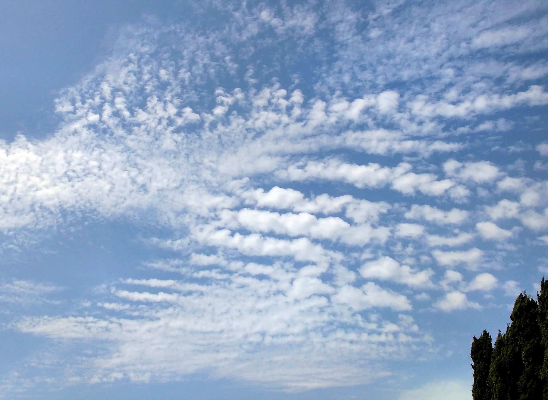 Piccole nubi cumuliformi con una base in comune, perlopiù bianche ma con leggere ombreggiature (Altocumulus castellanus, disposte in più file (varietà undulatus). Nella parte superiore della foto i cumuli appaiono più disorganizzati e con la base sfrangiata per cui essi, pur appartenendo sempre al genere Altocumulus, devono essere classificati sotto la specie floccus. L'intero gruppo nuvoloso è accompagnato sulla sinistra da un banco di cumuli più piccoli, bianchi e di forma irregolare. Si tratta di Cirrocumulus floccus. Tutte le suddette specie indicano una moderata instabilità dell'aria alle quote medio-alte.